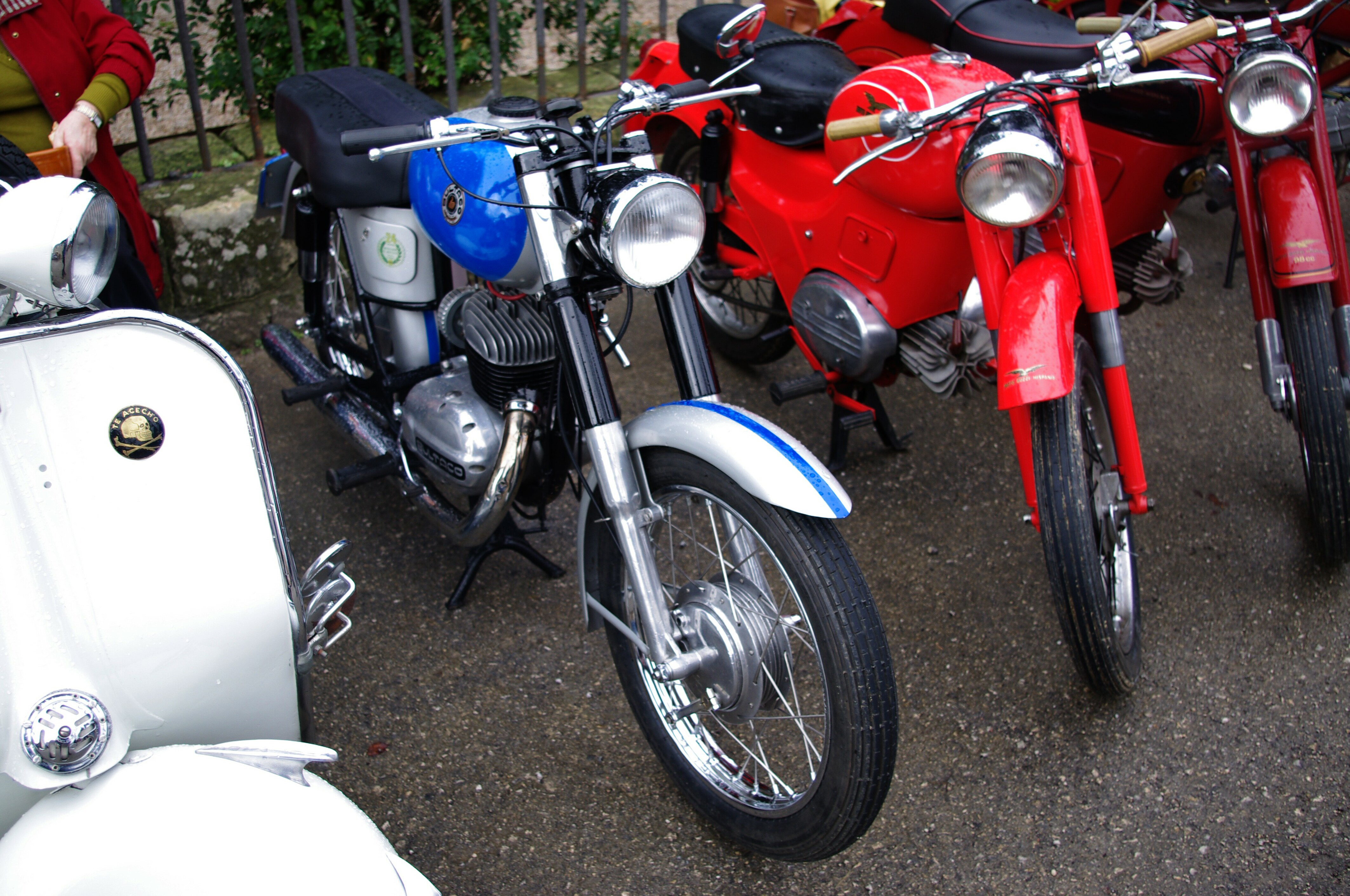 Bultaco